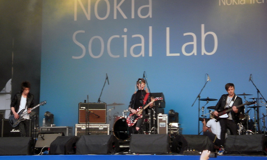 группа Marakesh на рекламном концерте Nokia в Киеве на Контрактовой площади 21 мая 2011